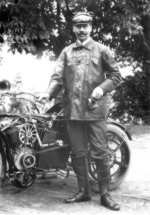 lékař a fotograf Feyfar Jaroslav